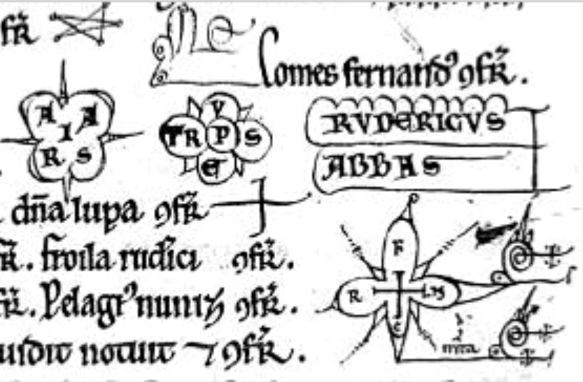 Signo e sinatura conde Fernando Peres de Trava nunha doazón ao mosteiro de Sobrado no 1142